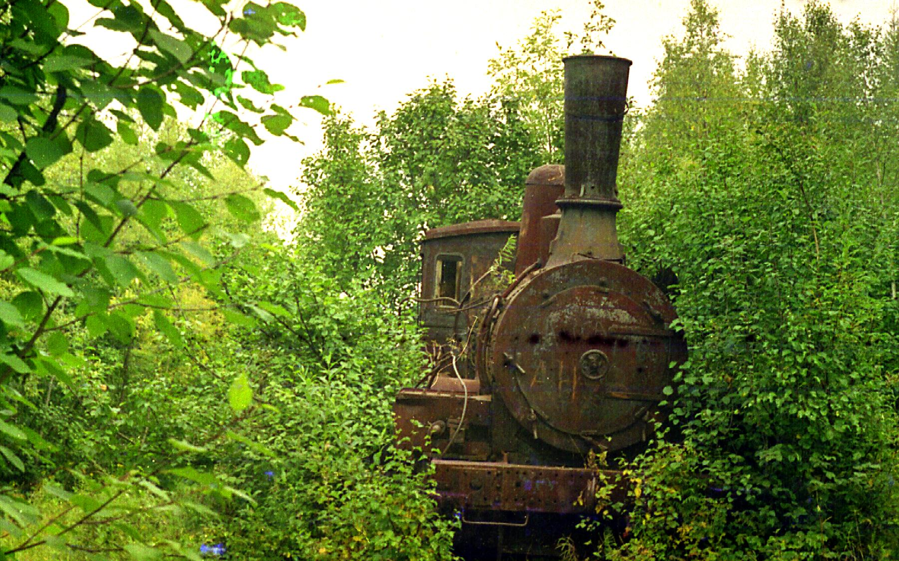 Ermakovo 2004: no next stop...